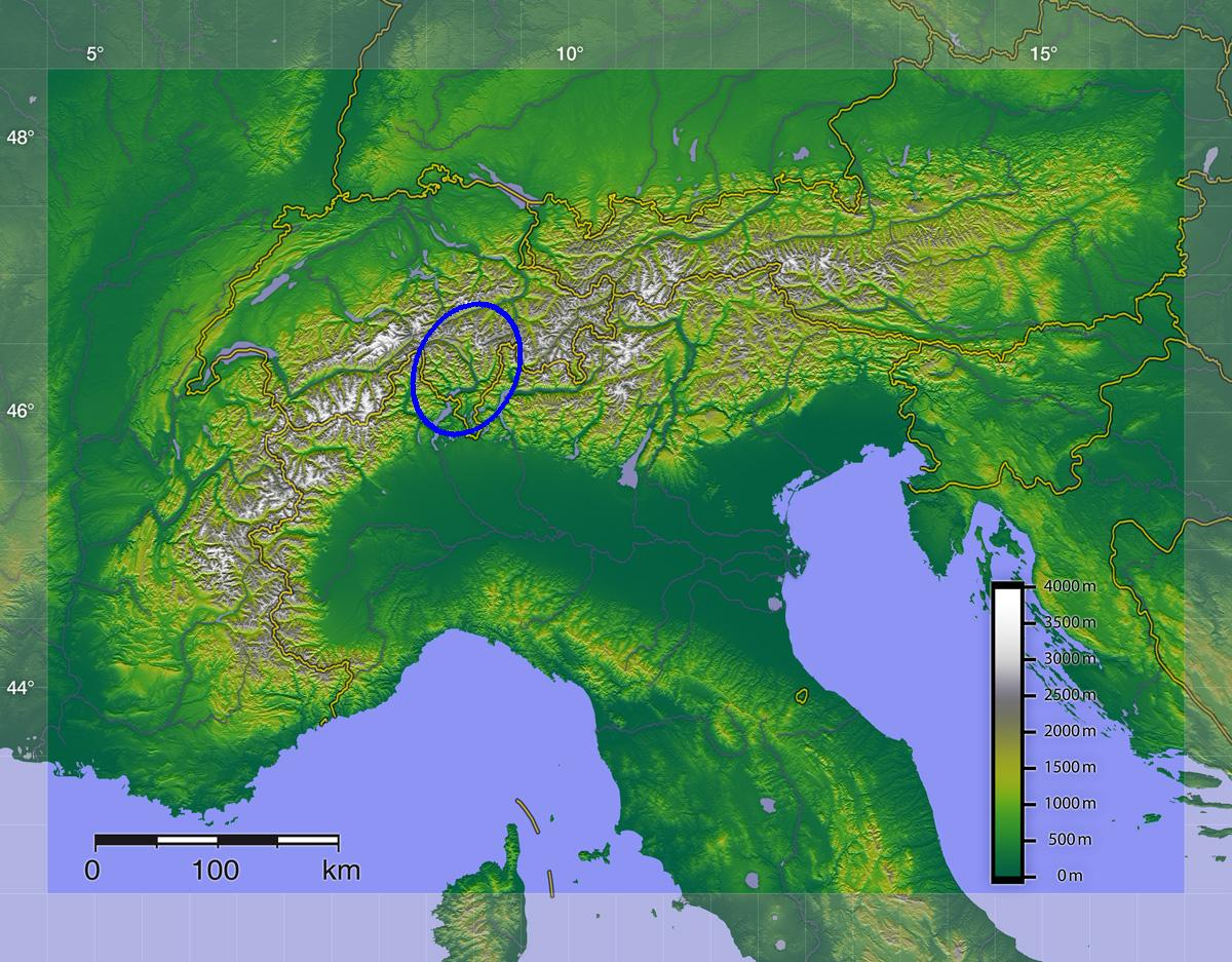 Лепонтинские Альпы на карте Альп